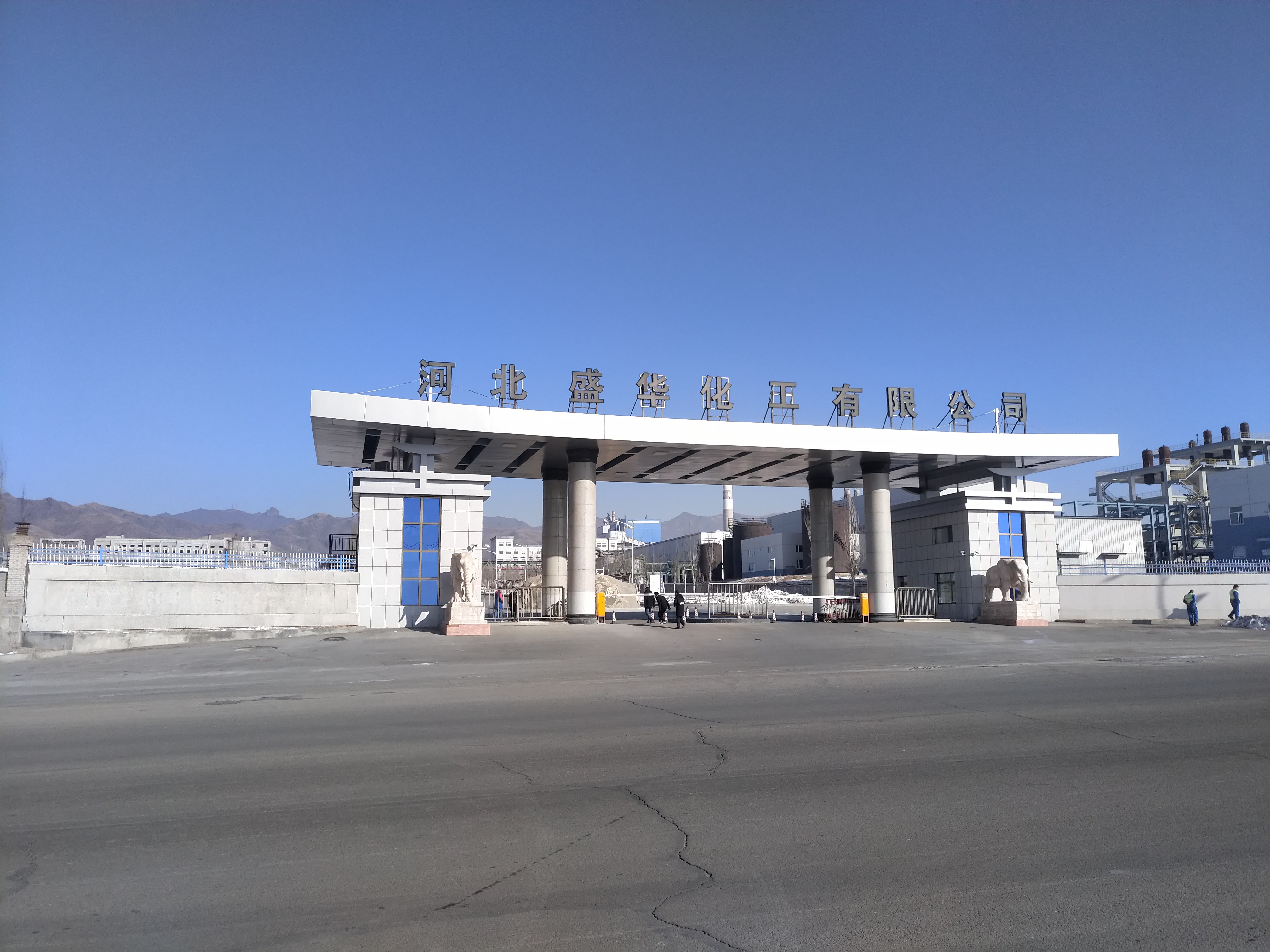 河北盛华正门